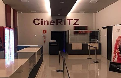 Bilheteria e Bomboniére do Cine Ritz Lafaiete